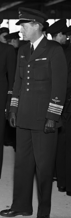 Bilden publicerad i Upsala Nya Tidning 1944-02-22. Bildtext: "--- och däröver översteadjutanten, löjtnant C. Lindbom, och divisionens flygsoldater, som ställt upp i kadetthangaren. Bredvid honom Bengt Jacobsson inspekterar fjärde divisionschefen löjtnant W. Brehmer."